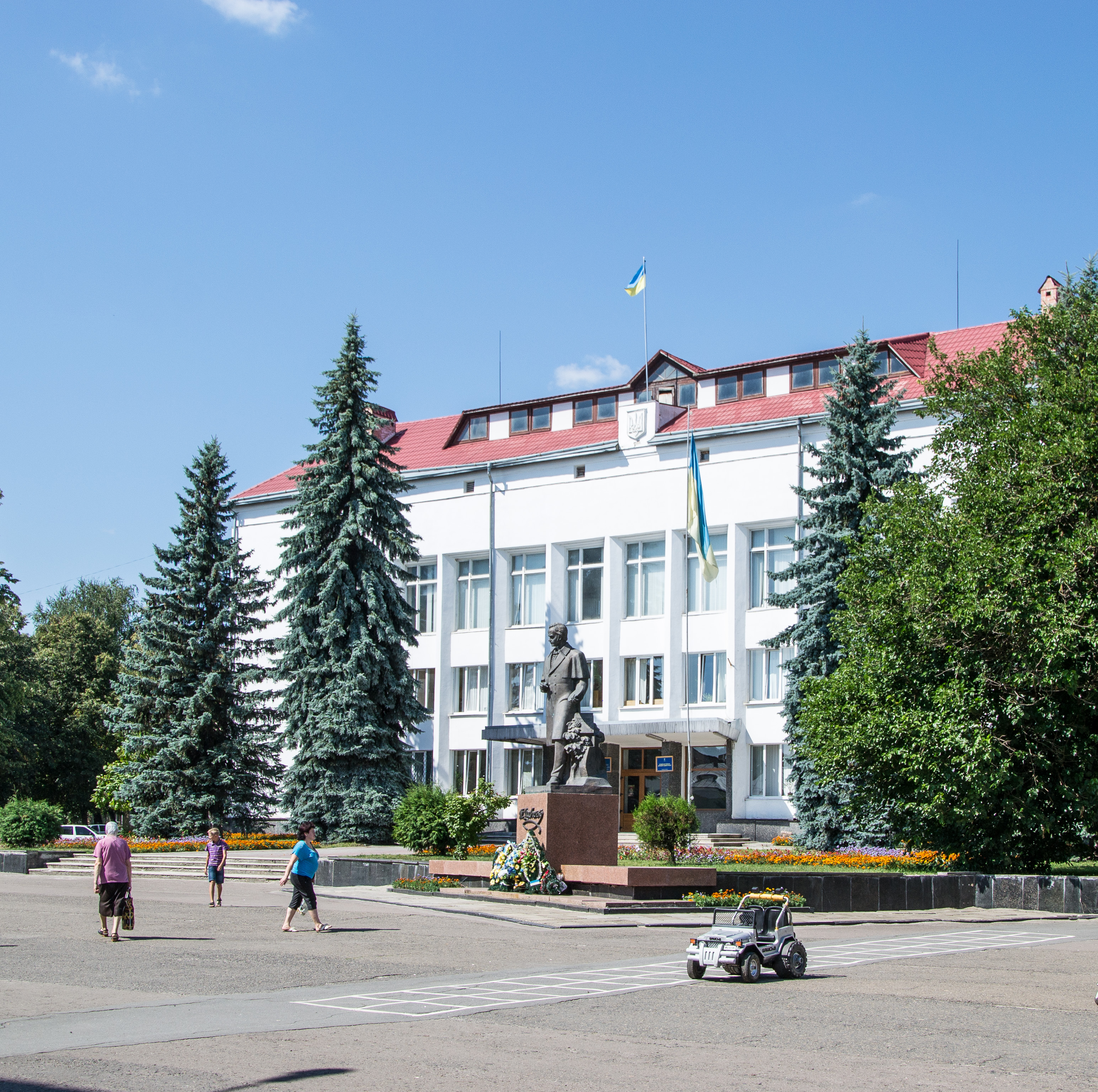 пам'ятник Т. Г. Шевченку, українському письменнику і художнику (ск. Б. Романець, арх. О. Ярема, 1993, бронза, граніт), Броди, пл. Ринок